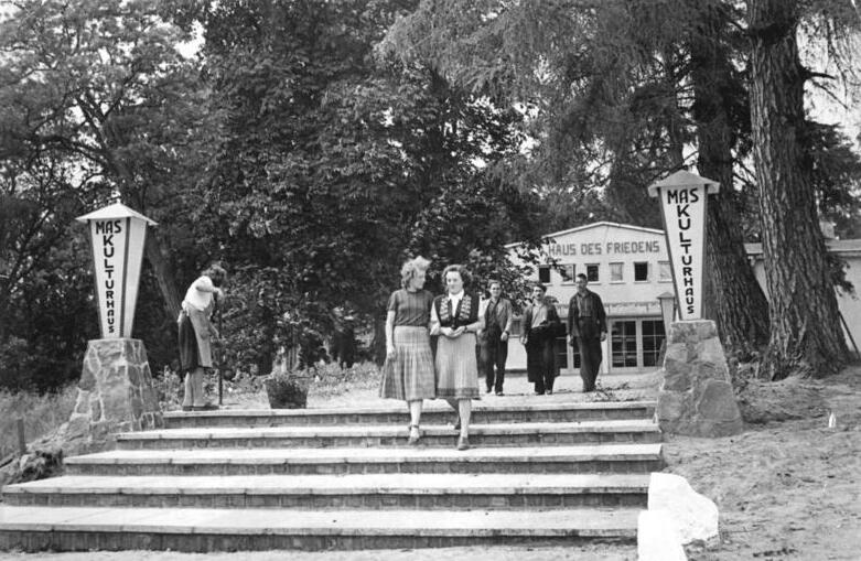 Blick auf ein MAS Kulturhaus Zentralbild Klein Juli 1951 Wiederaufbauarbeiten im Oderbruch. Durch die schweren Kämpfe in den letzten Tagen des Krieges und die Hochwasserkatastrophen im Frühjahr 1947 und 1950 wurde das Oderbruchgebiet stark verwüstet. Die Wiederaufbauarbeiten und die geplante Neugestaltung des Oderbruchgebietes sind im vollen Gange. Durch die Solidaritätsaktion der Werktätigen in der Deutschen Demokratischen Republik war es möglich, in den Oderkreisen zahlreiche Wohnungen und Ställe in kurzer Zeit wieder aufzubauen. UBz: Eines der schönsten und vorbildlichsten Kulturhäuser der Deutschen Demokratischen Republik wurde bei der MAS Trebus - Kreis Seelow in gemeinsamer Arbeit der Werktätigen von Stadt und Land gebaut.